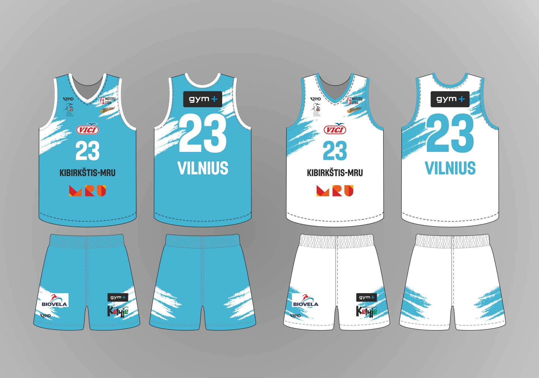 Kibirkšties varžybinės aprangos 2019-2020 sezone